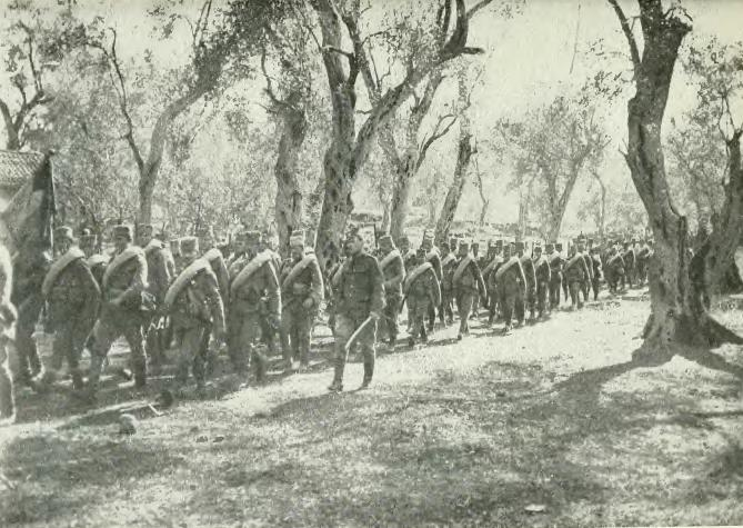 División serbia "Vardar" en Corfú.